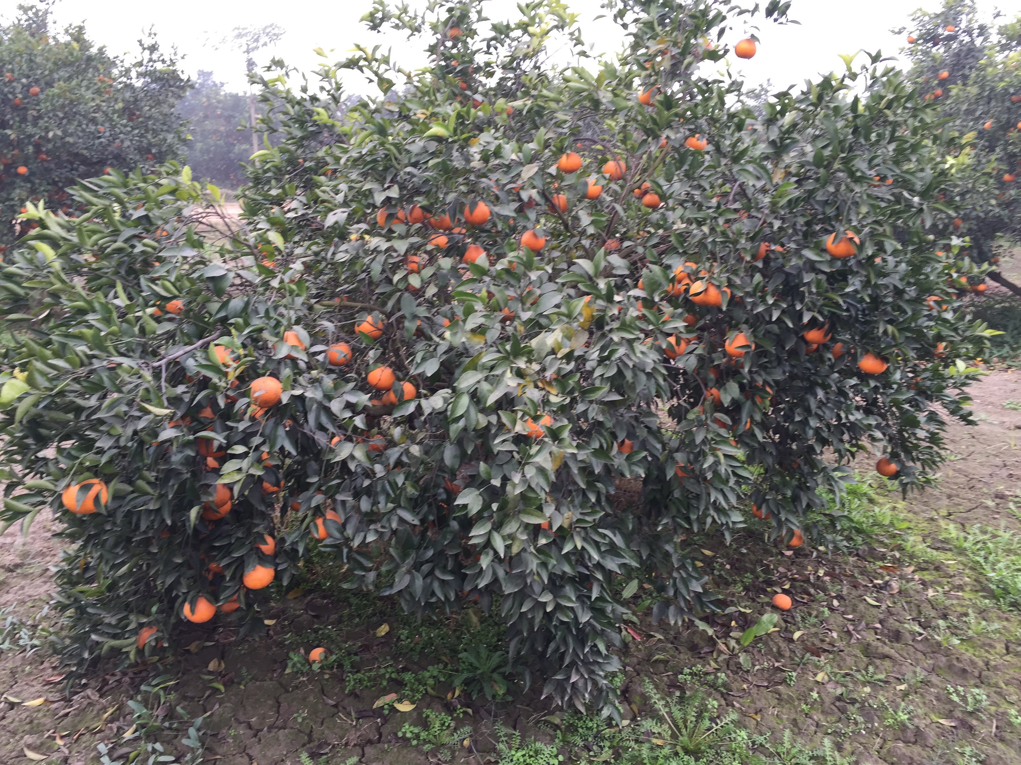 چک نمبر ۵ جنوبی میں واقع کنّو کا باغ